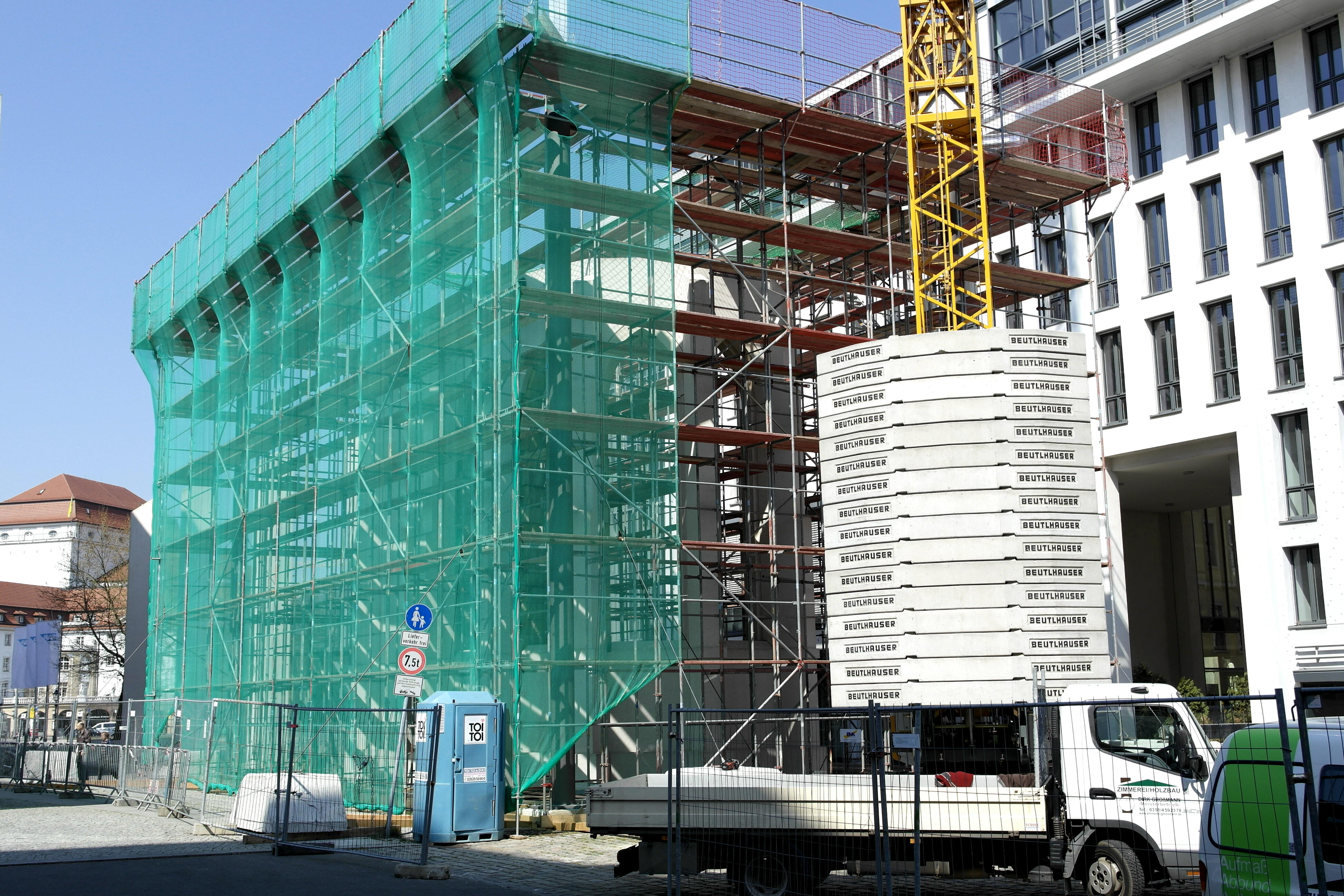 Gedenkstätte Busmannkapelle in Dresden 2015